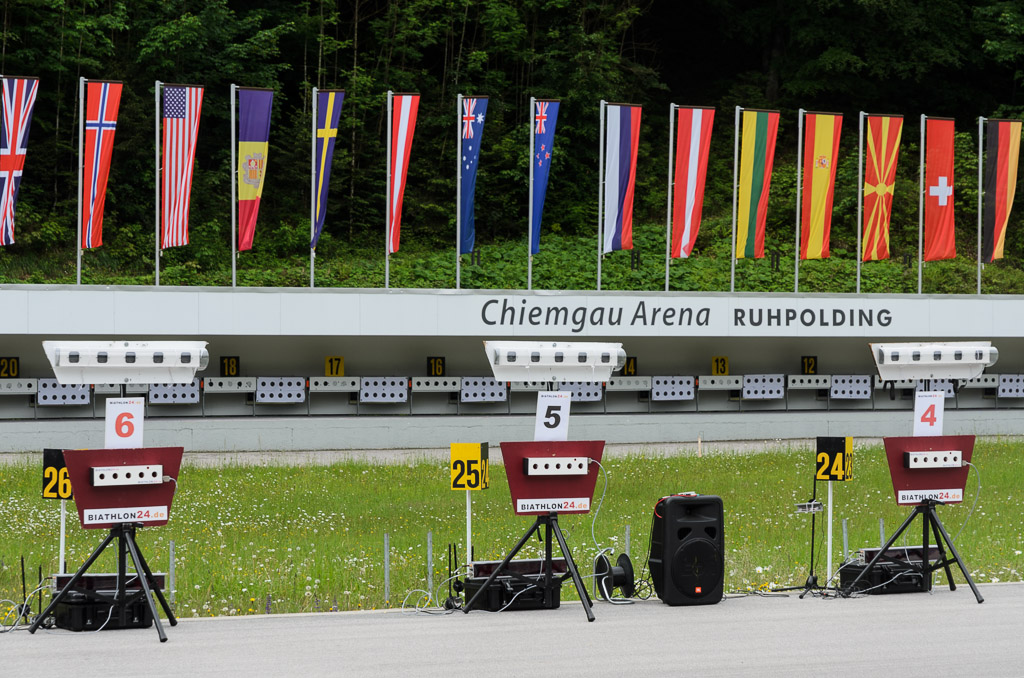 Lichtgewehr-Anlage für den Modernen Biathlon mit Klappscheibenvisualisierung in der Chiemgau Arena in Ruhpolding